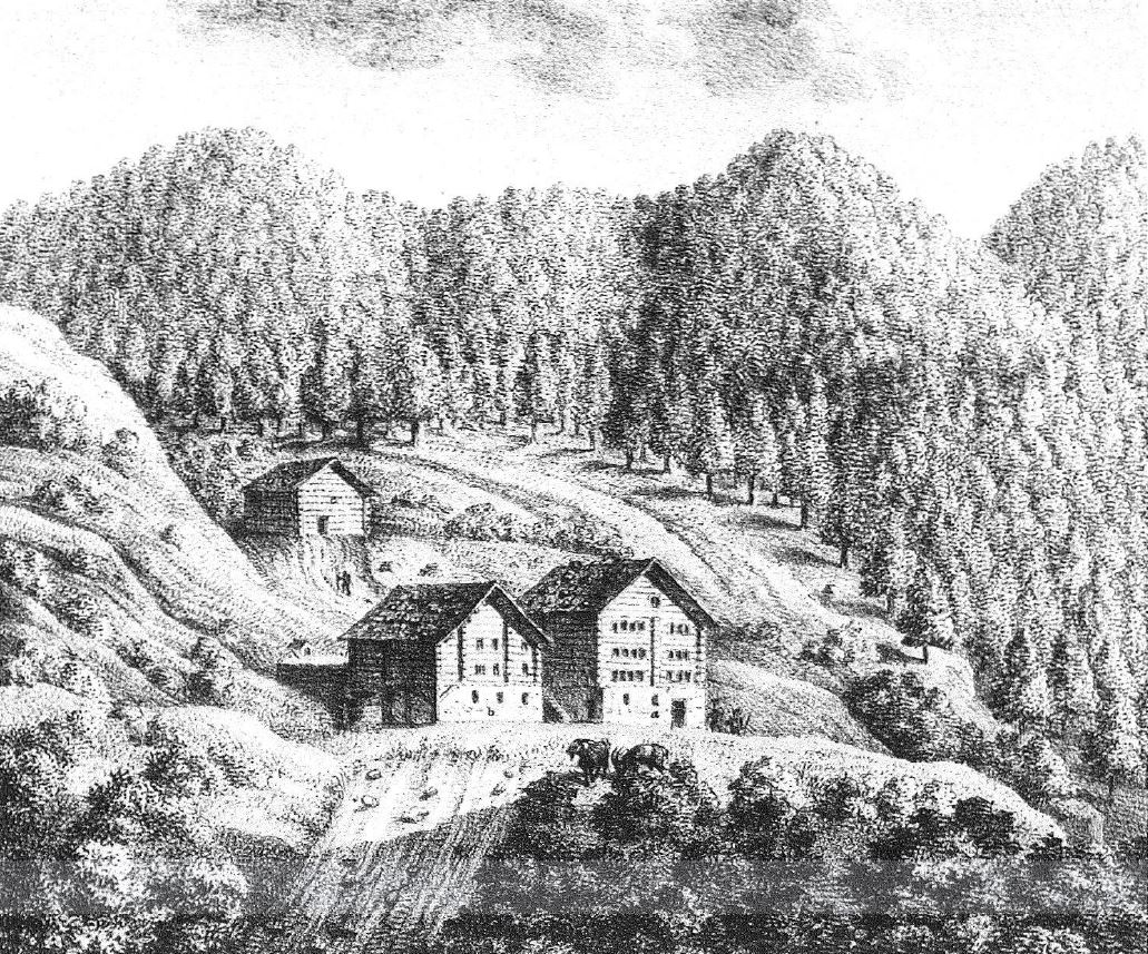 Bad Jenaz GR, Schweiz